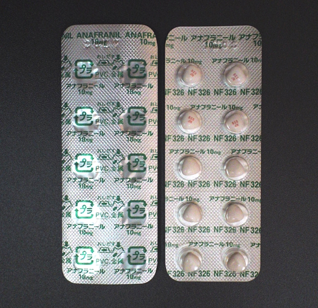 アナフラニール（塩酸クロミプラミン錠） 10mg. Anafranil (Clomipramine) in Japan.